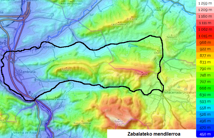 Zabalateko mendilerroaren mapa topografikoa.